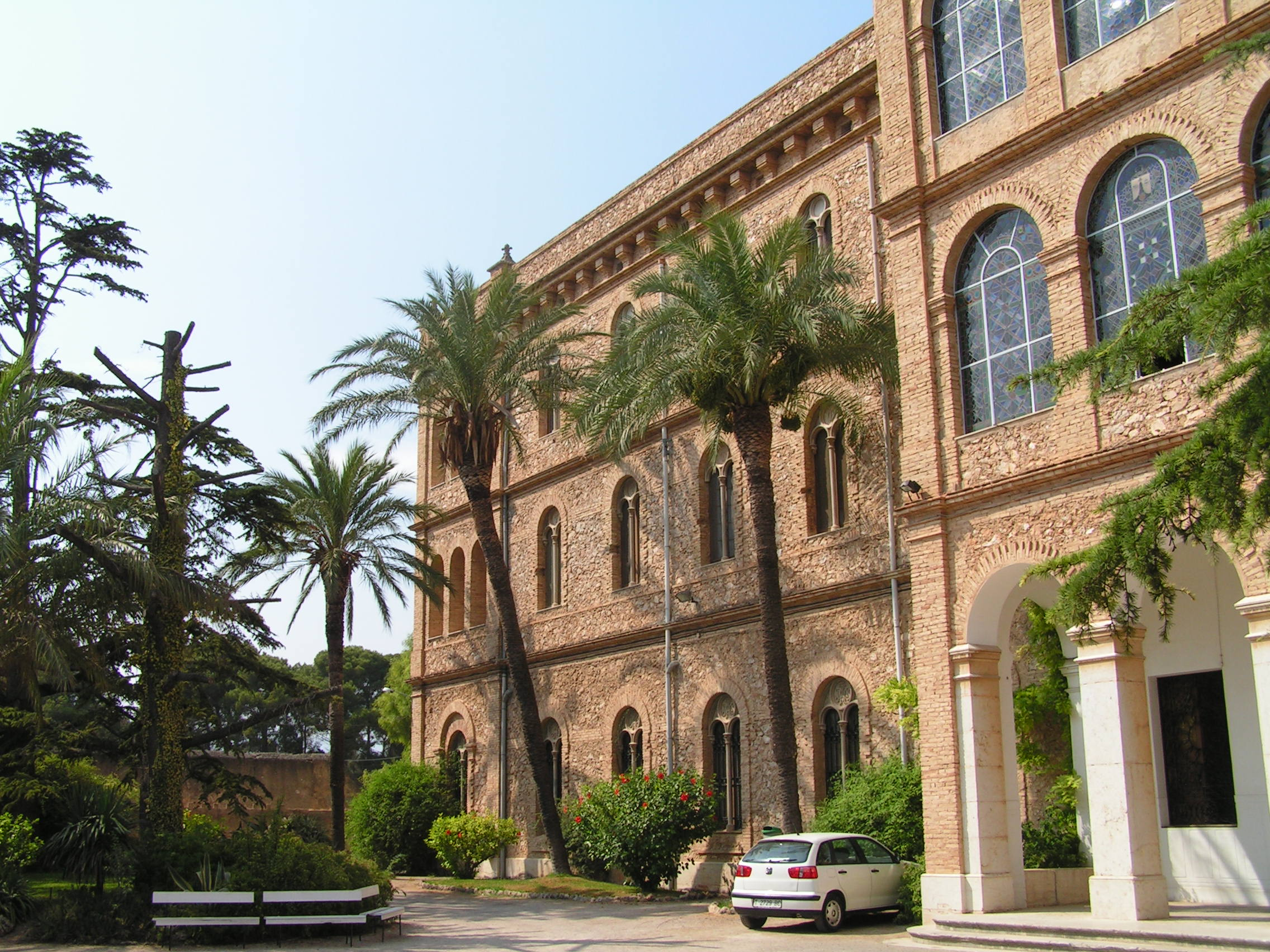 Convent de les Teresianes — a la ciutat Catalana de Jesús